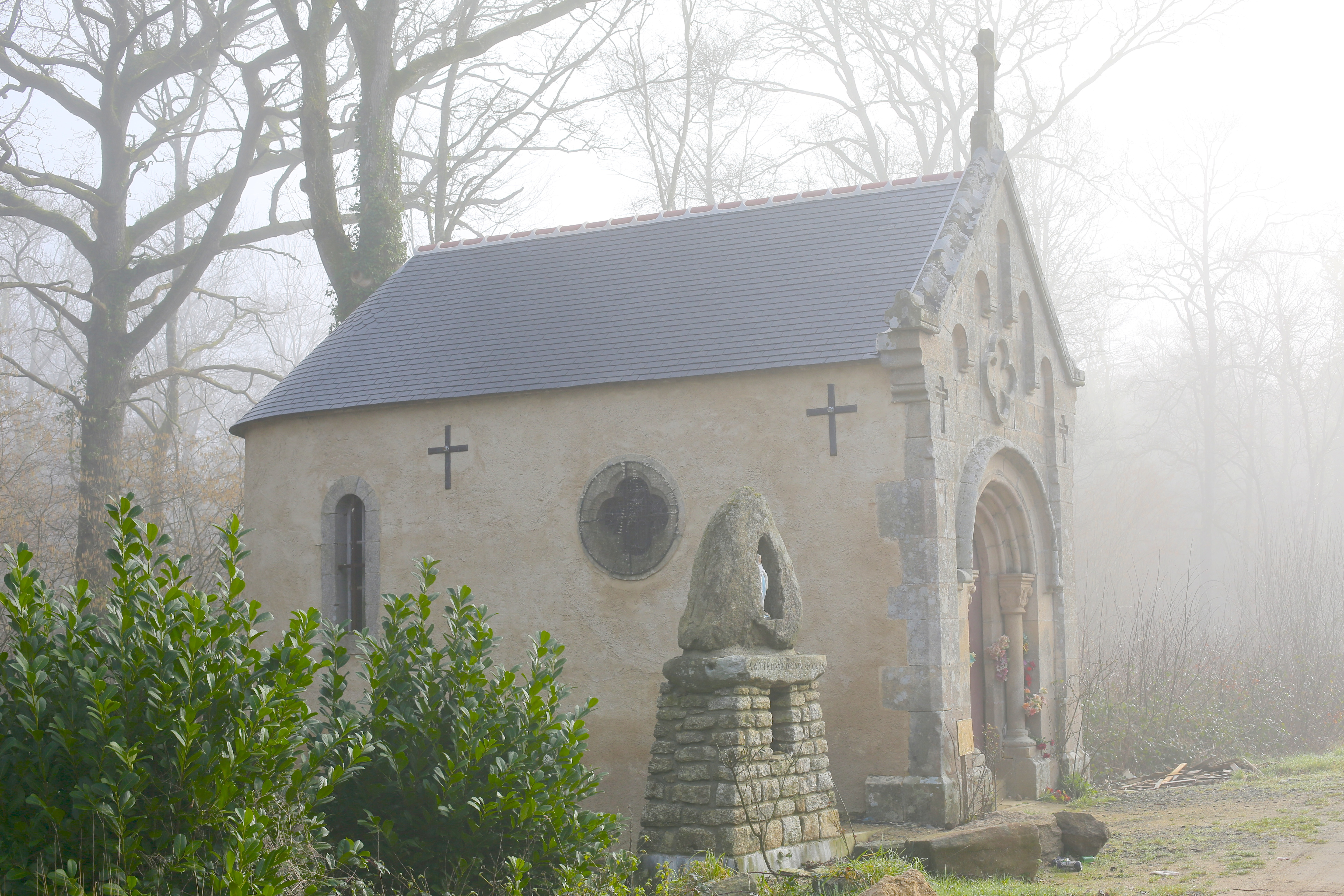 Chapelle Notre-Dame de Bonsecours aux Champs-Géraux.